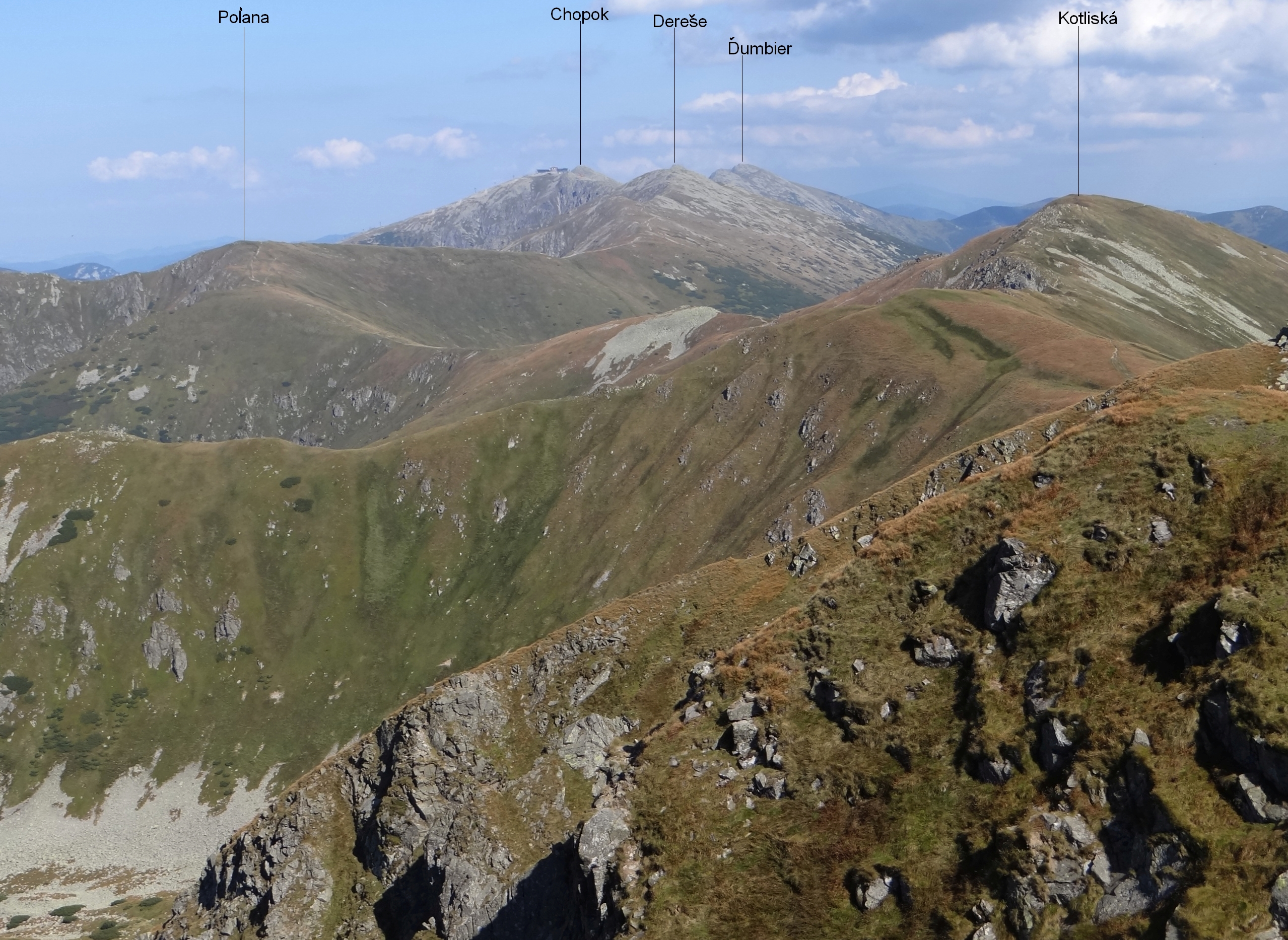 View from Chabenec